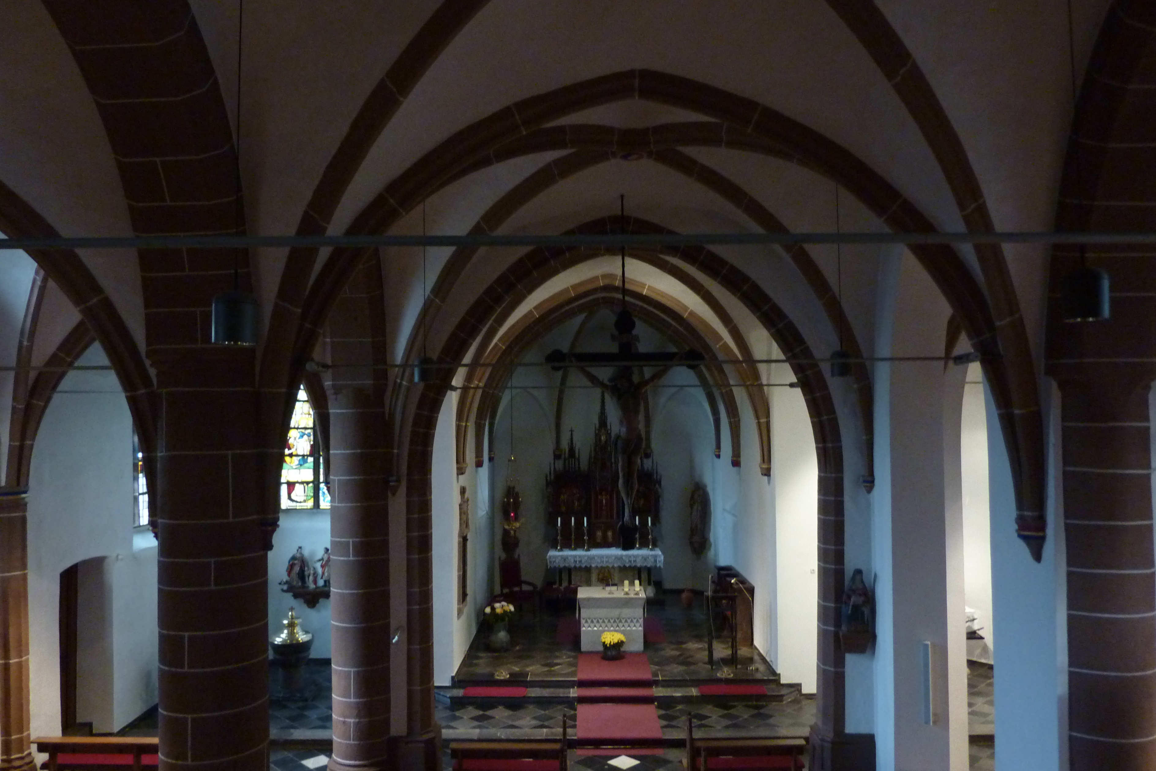 Innenaufnahme der katholischen Pfarrkirche St. Martin in Drove